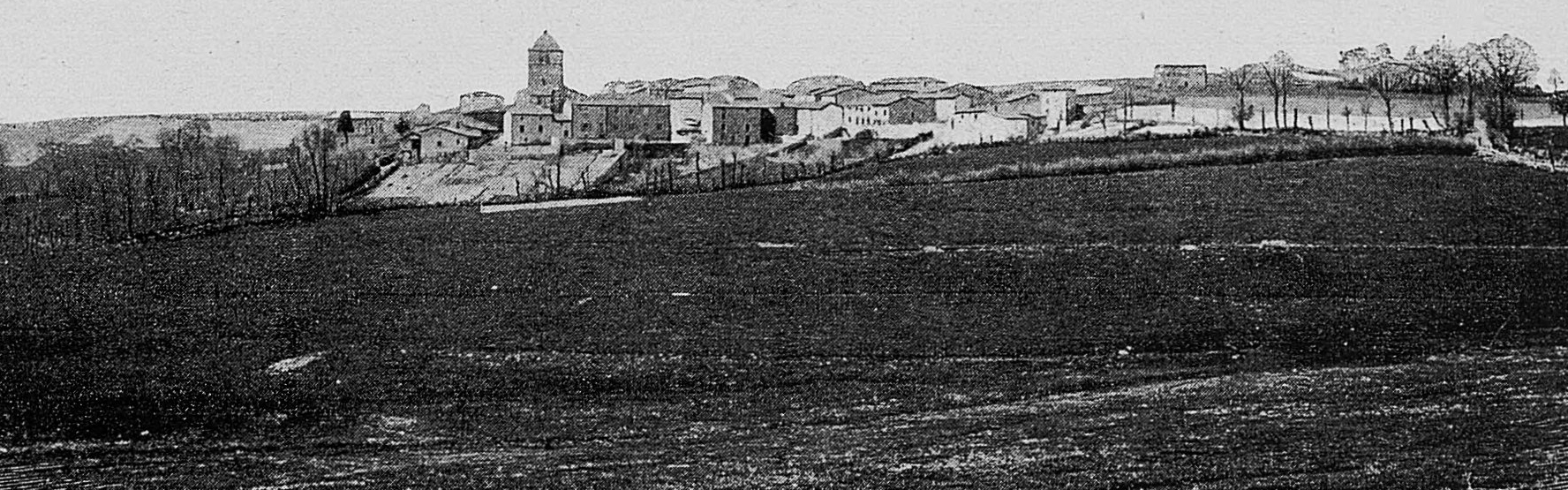 Dictionnaire illustré des communes du département du Rhône. Tome 1 / par MM. E. de Rolland et D. Clouzet.